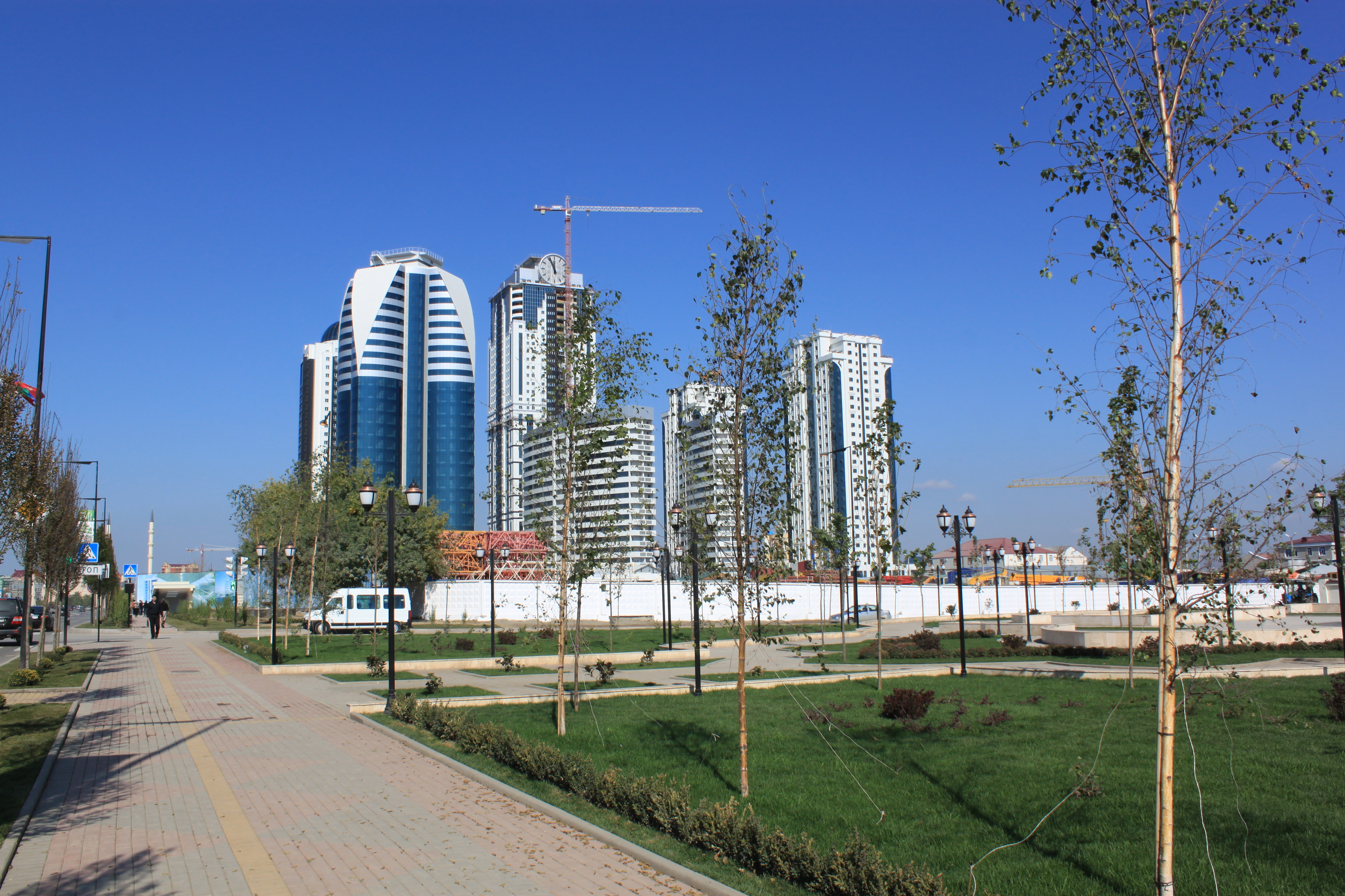 Грозный сити